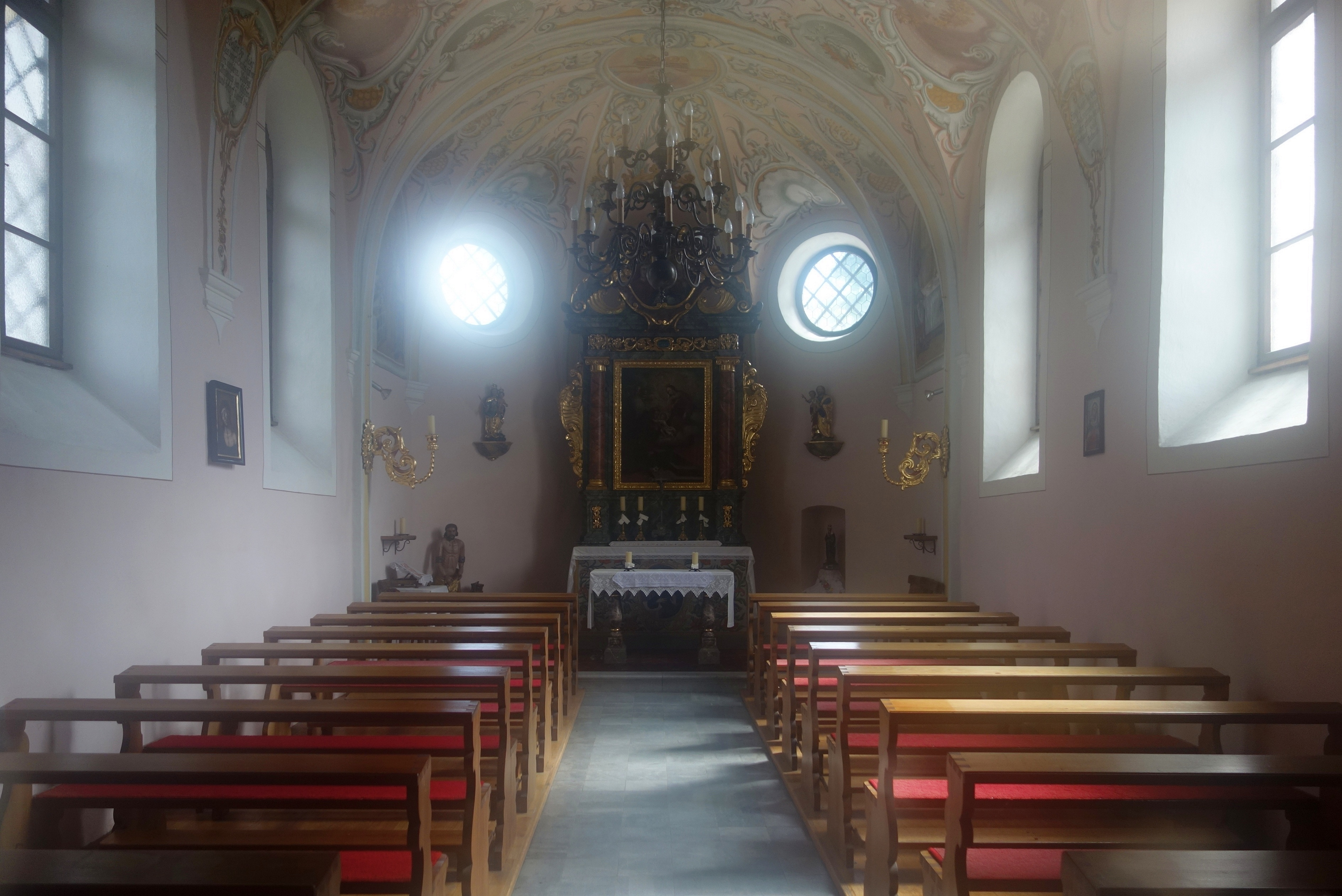 Kapelle St. Anton am Fratres